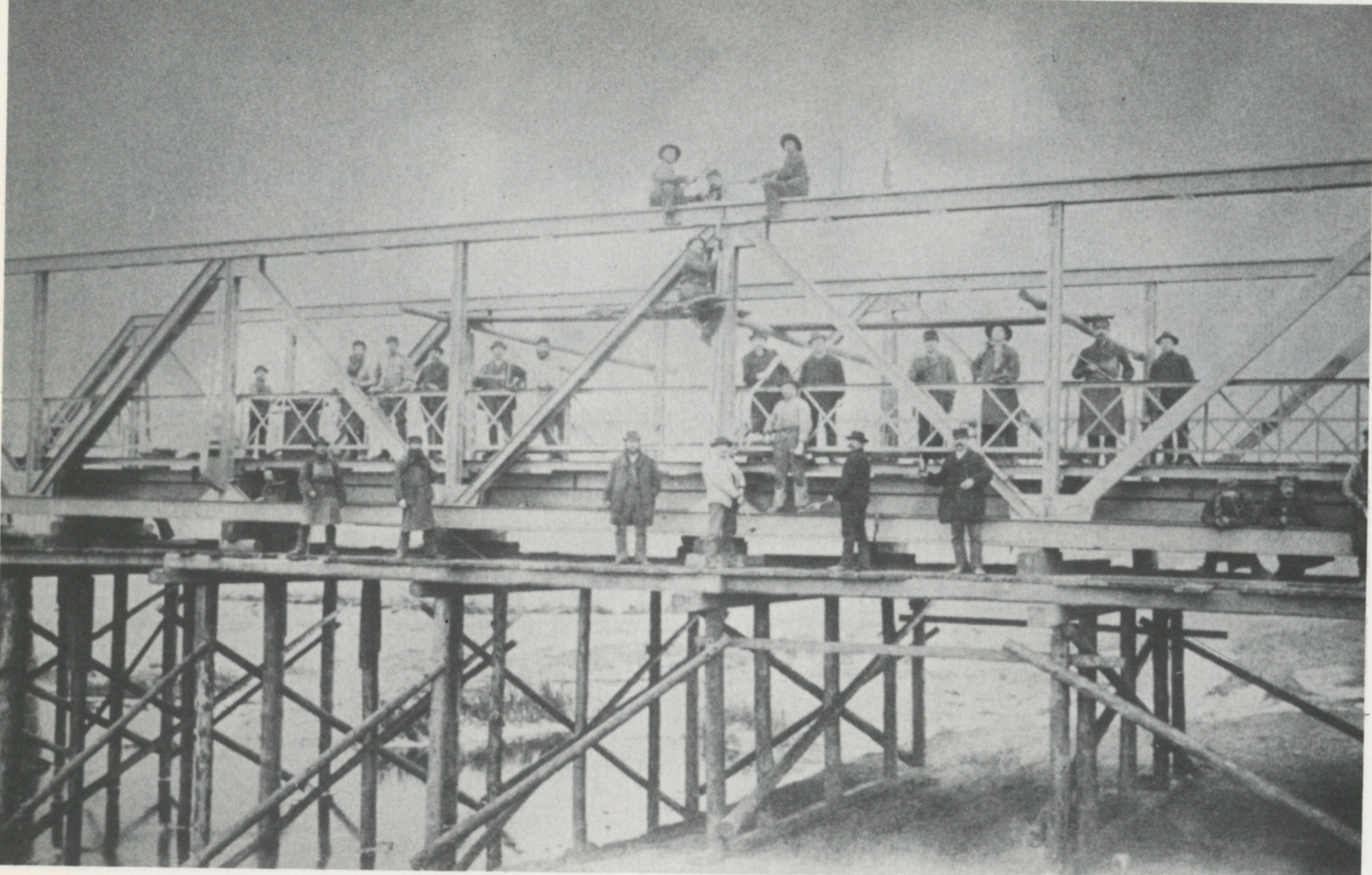 Fotografie aus Schwarzach am Main 1889: Bau der Mainbrücke bei Schwarzenau durch die Würzburger Firma Noell.